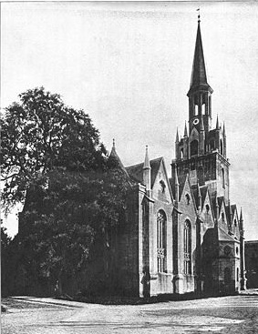 Johanniskirche Memel